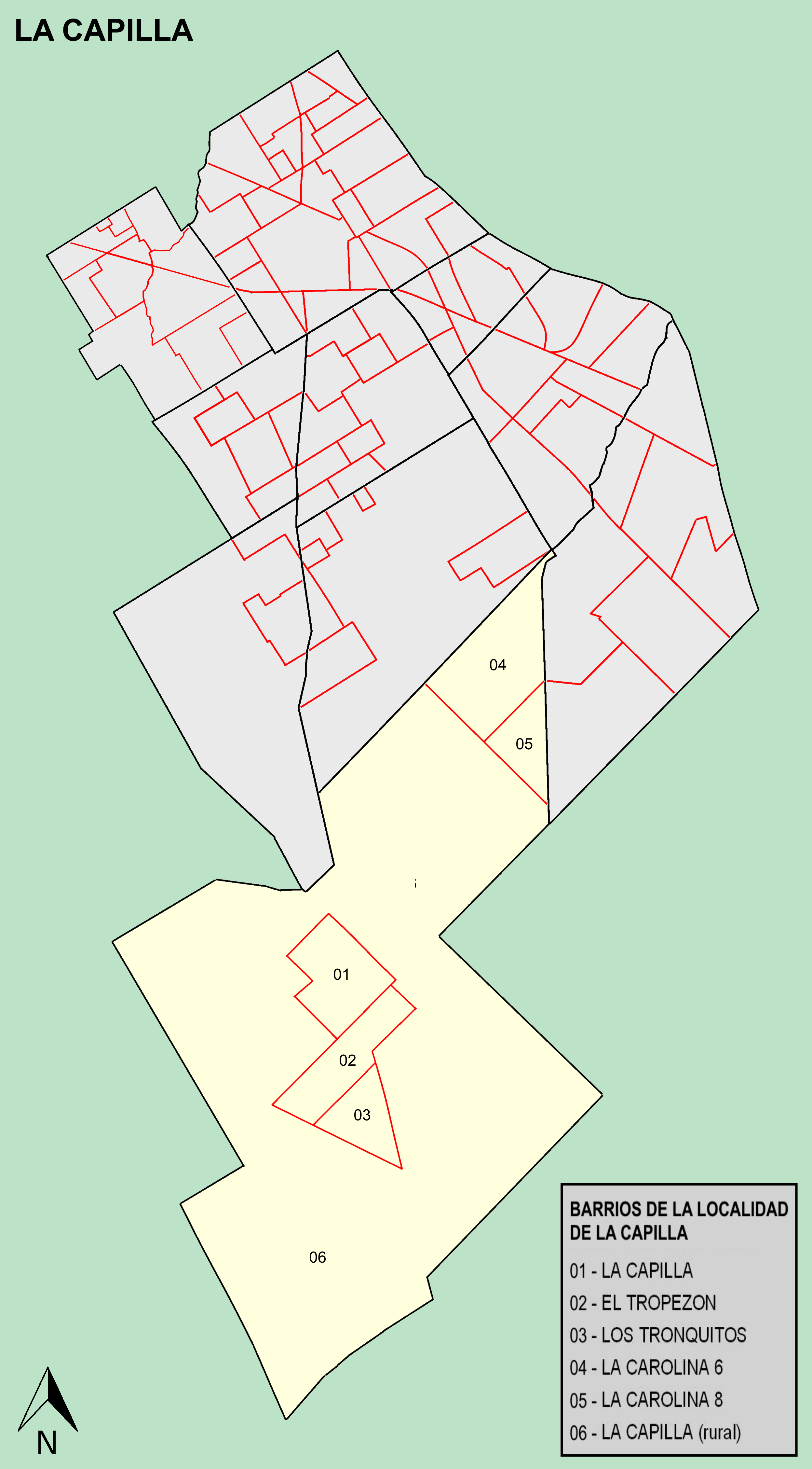 Mapa barrios de La Capilla